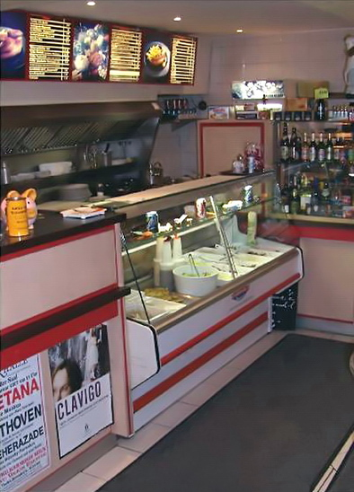 Eppendorfer Grillstation. Drehort der WDR-Fernsehserie "Dittsche – Das wirklich wahre Leben"